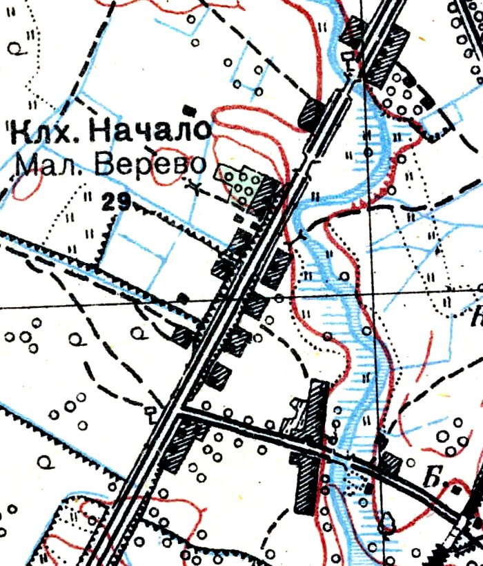 Топографическая карта Ленинградской области, квадрат О-36-13-А-б (Пос. Тайцы), деревня Малое Верево